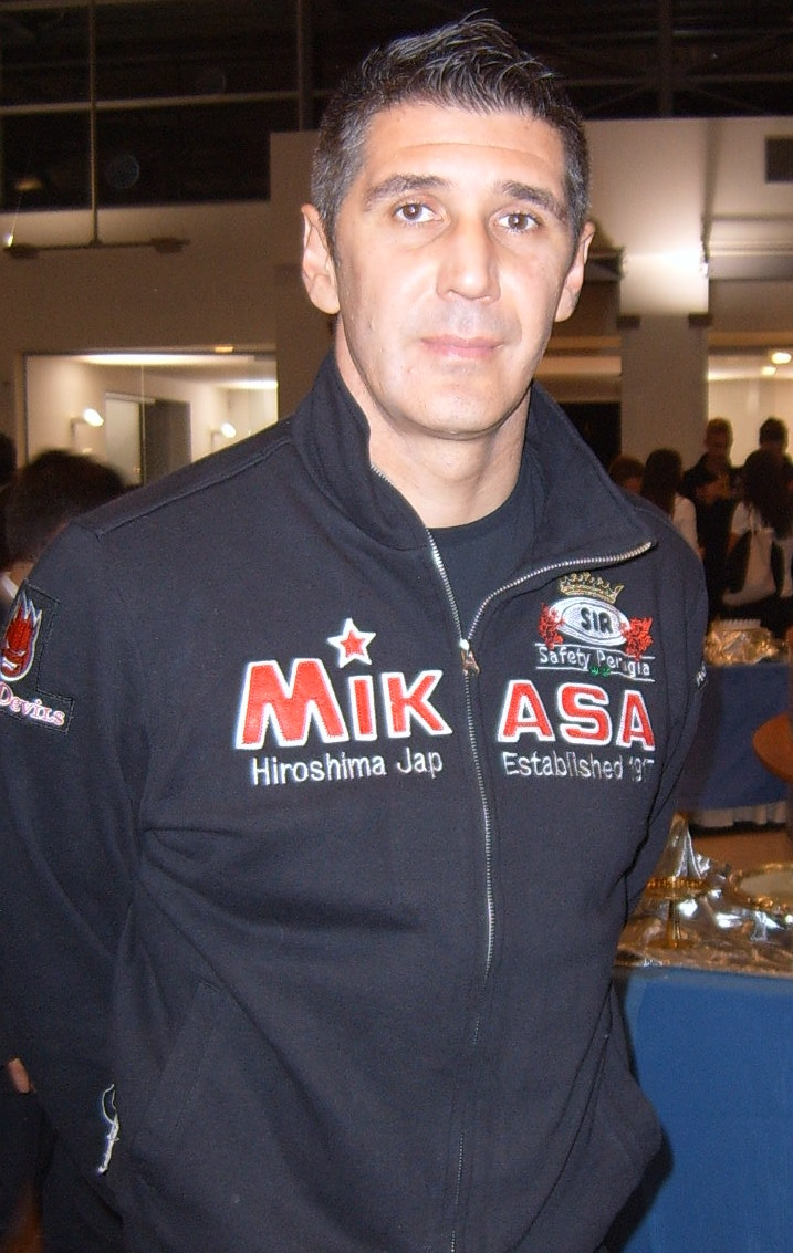 Presentazione Sir Safety Umbria Volley 2013-2014